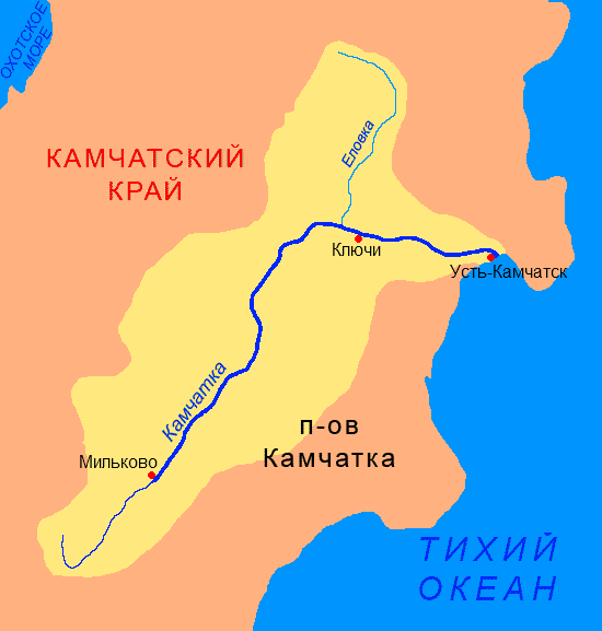 Схема бассейна реки Камчатка